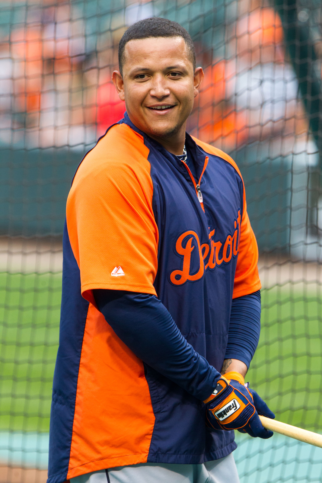 Miguel Cabrera